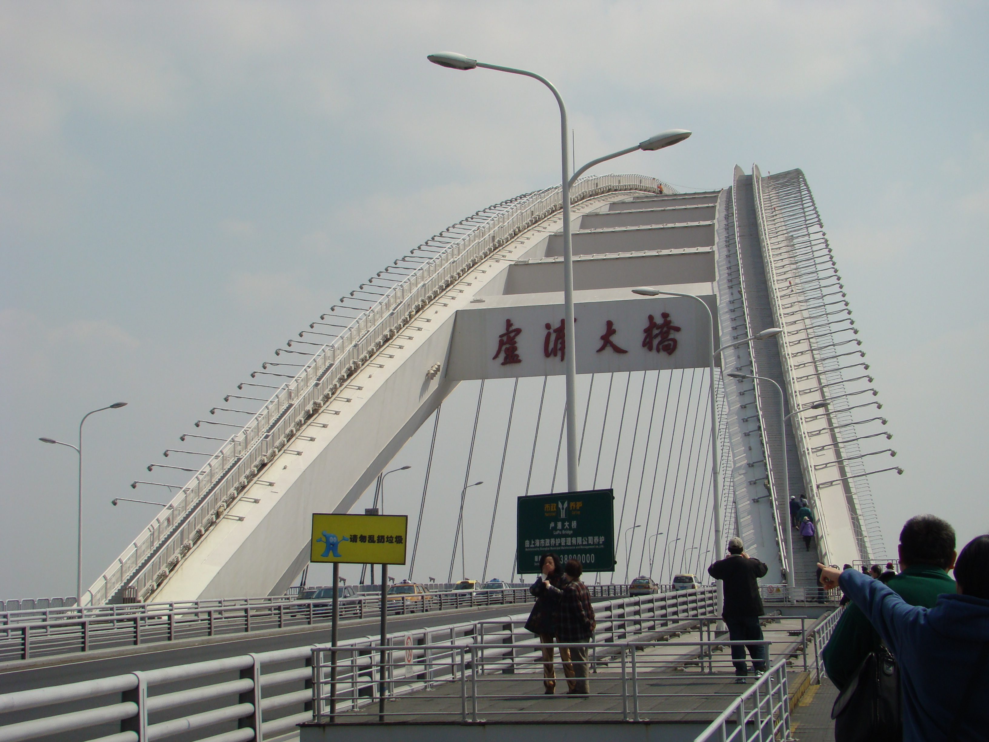 卢浦大桥13层平台